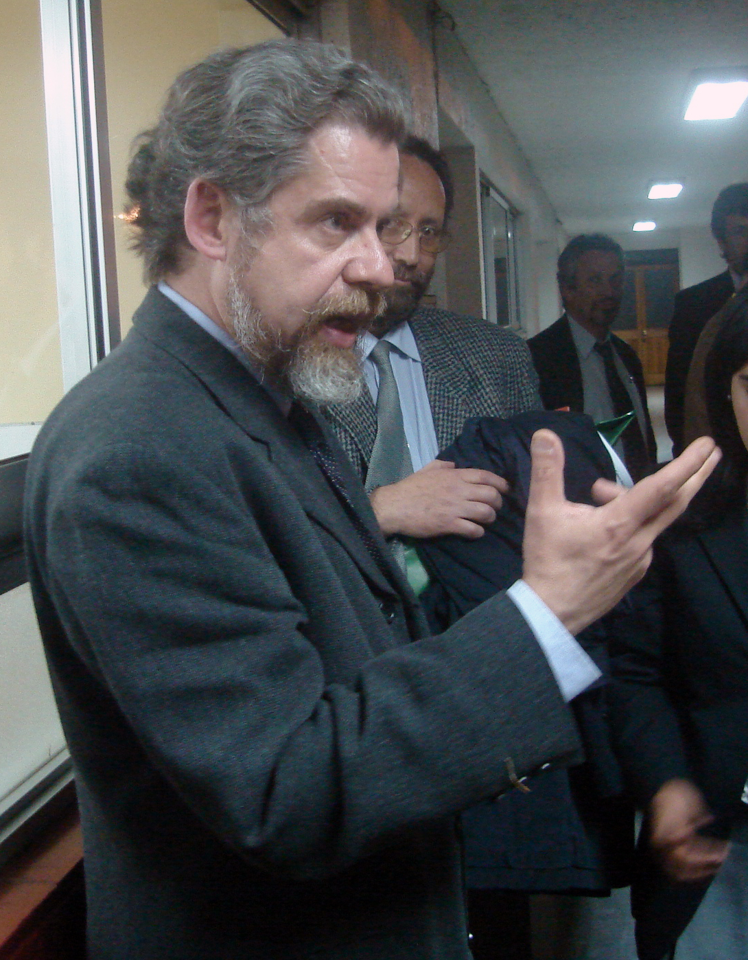 Alfrddo Jocelyn-Holt